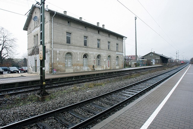 Bahnhofsgebäude des Haltepunkts Aalen-Wasseralfingen